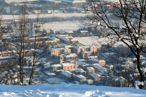 Fotografia scattata dalla Croce di Santo Stefano. Riprende il centro storico di Collebeato (BS)